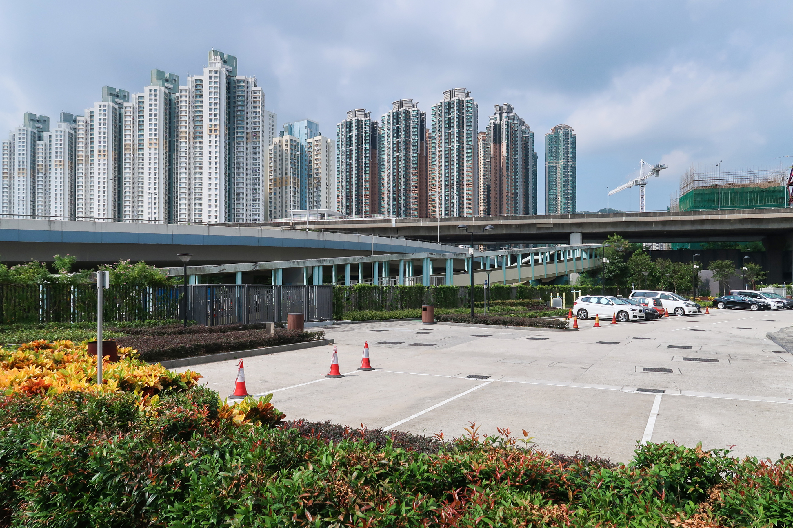 Hoi Ying Estate carpark